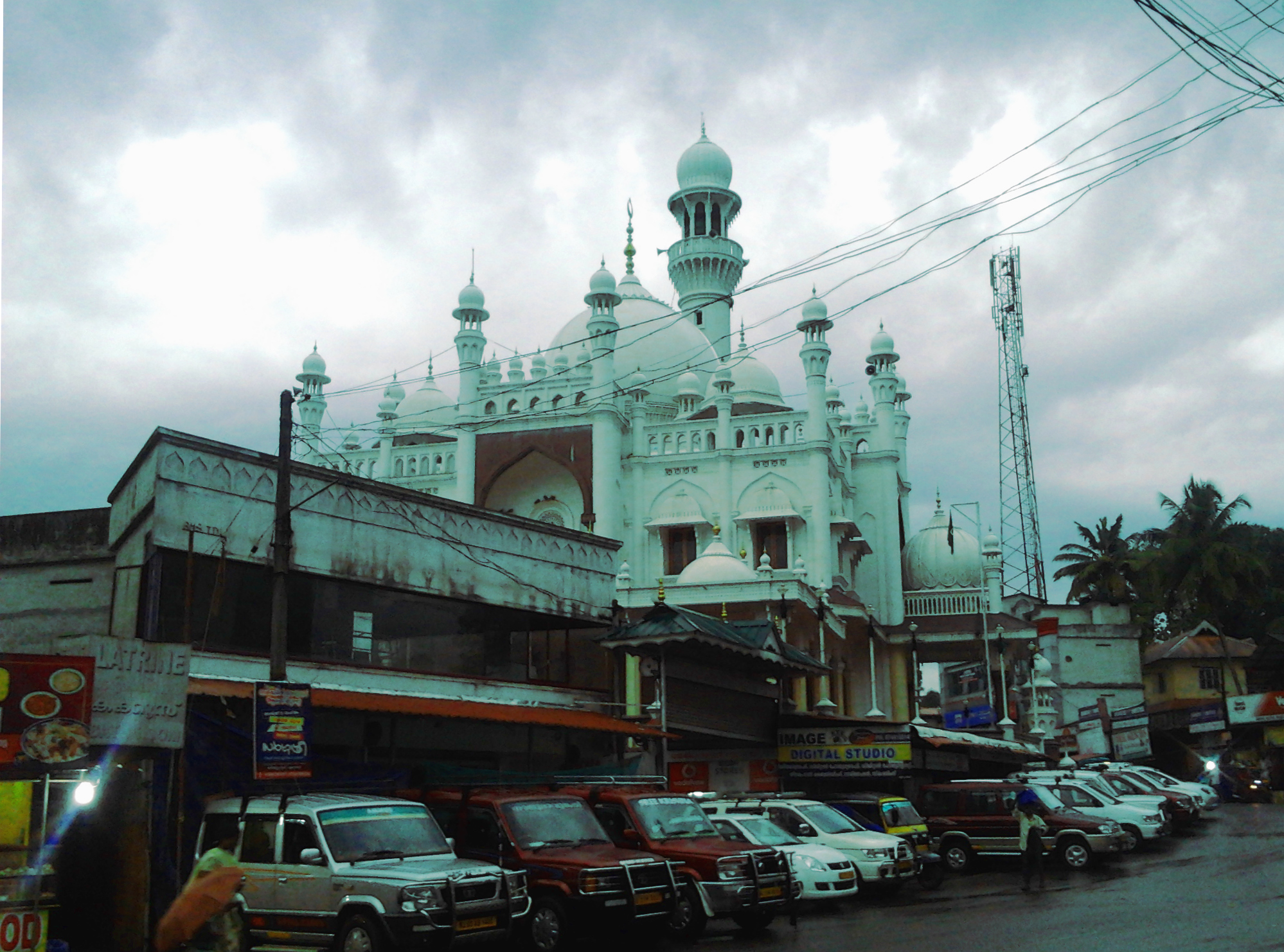 എരുമേലി വാവർ പള്ളി